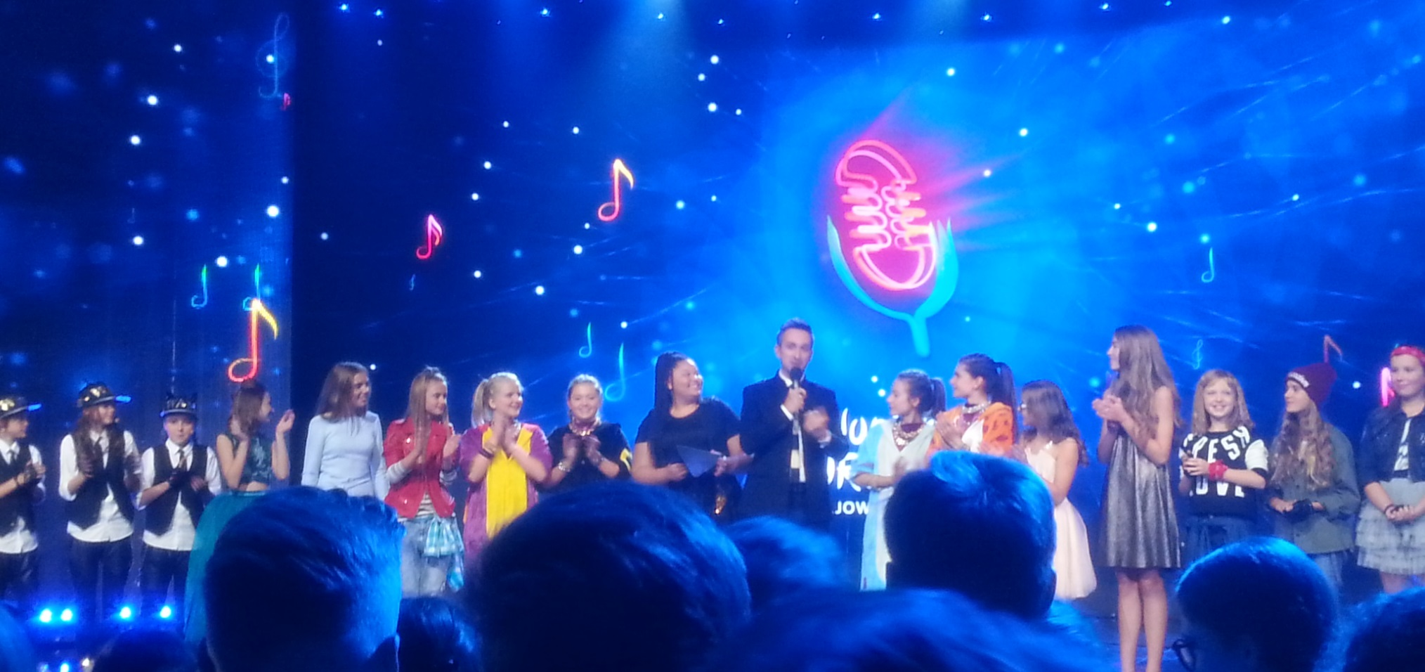 Uczestnicy finału krajowych eliminacji do Konkursu Piosenki Eurowizji dla Dzieci wraz z Destiny (zwyciężczynią konkursu w 2015) i prowadzącym Radosławem Brzózką; Warszawa, 15 października 2016